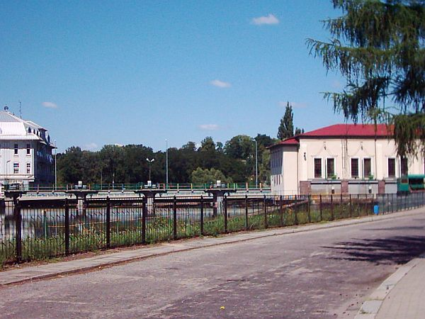 Elektrownia wodna i przejście graniczne w Gubinie. Fotografia mojego autorstwa (B.Mikołajko), 1905